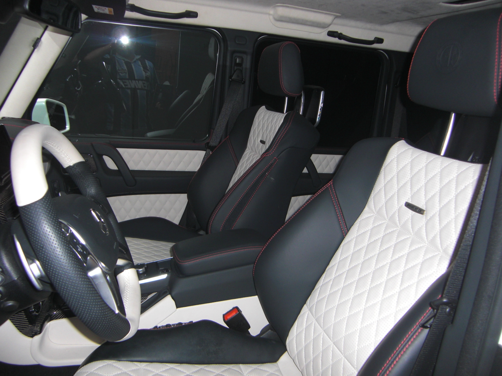 メルセデス・ベンツ Gクラス